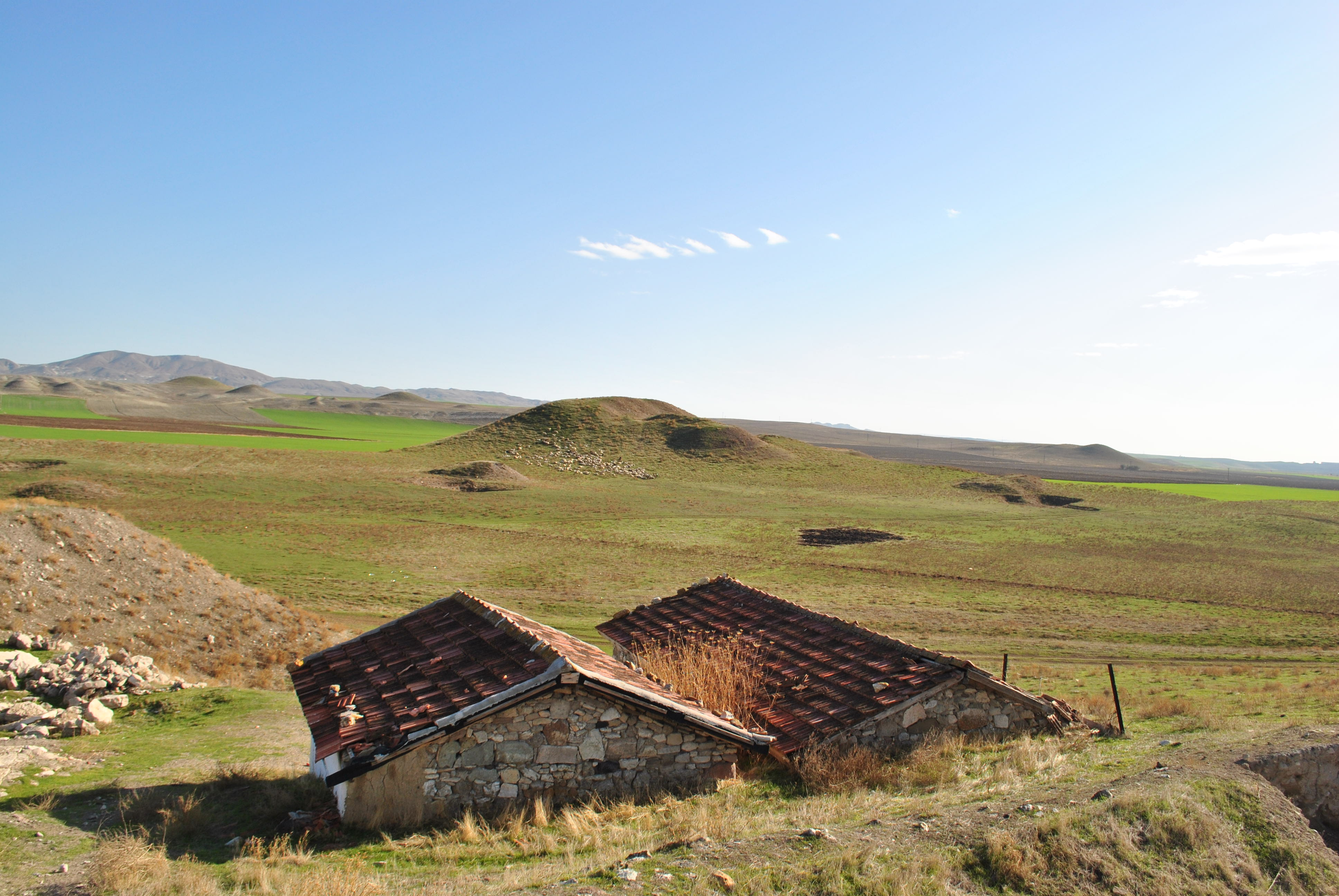 Gordion kalesi ve kazı alanı